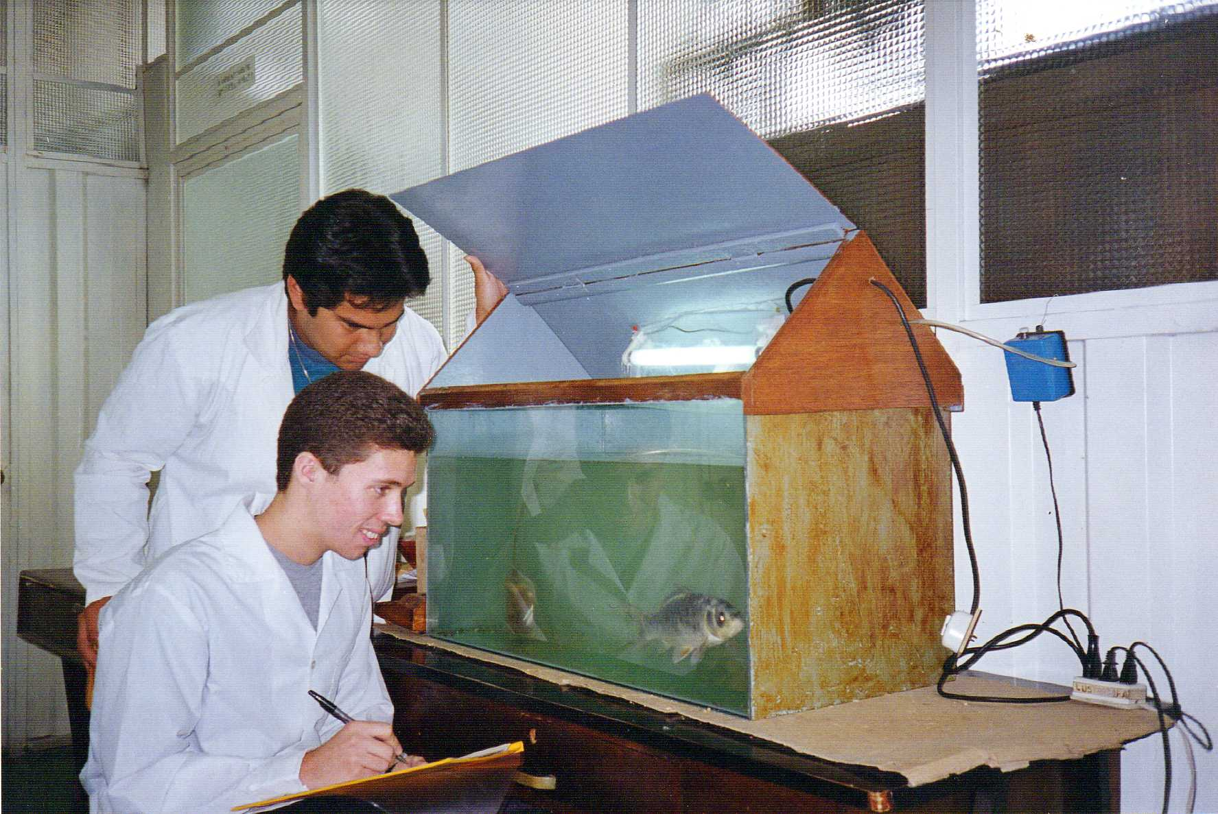 Experimento de discriminación visual con ejemplares de pez Carpa común (Cyprinus carpio). Fotografía demostrativa.